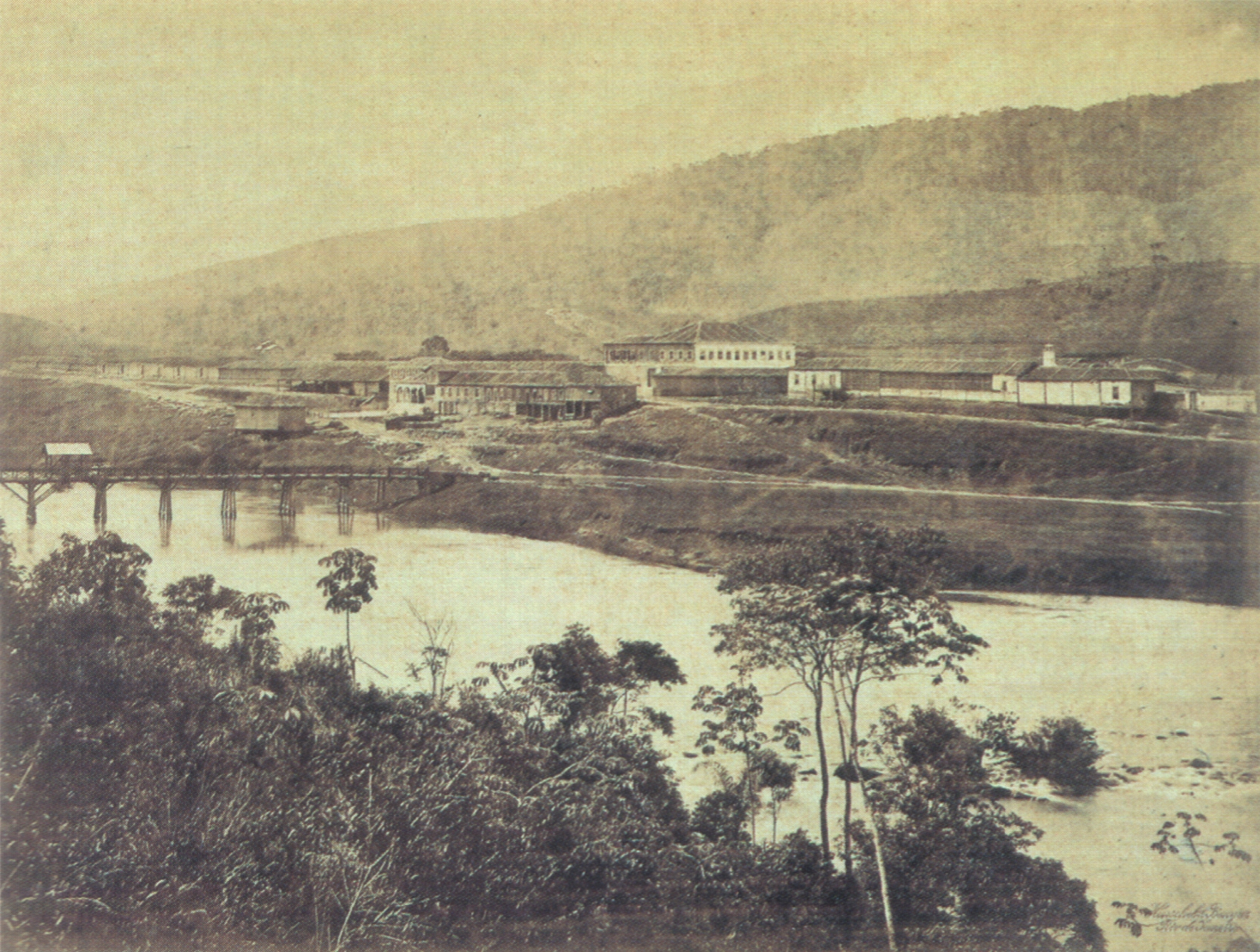 Fazenda da Cachoeira. [Propriedade do Commendador Manoel da Rocha Leão, sita na base do Itatiaia a 442 metros.] Albúmen, 21,7 x 29 cm.